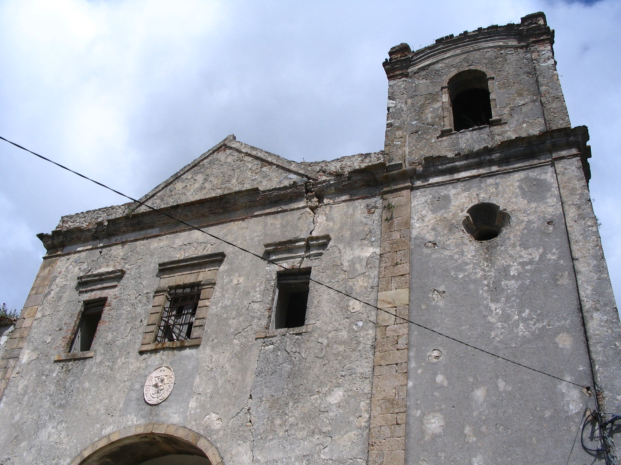 Monchique - ruines du monastère Nossa Senhora do Desterro - Algarve - Portugal